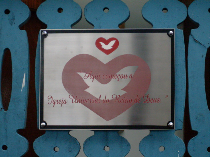 Coreto do Meier no Rio de Janeiro